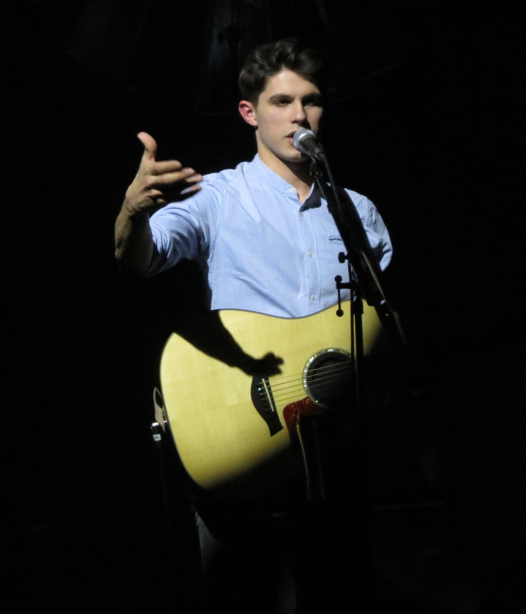 Lilian Renaud Espace Chaudeau à Ludres